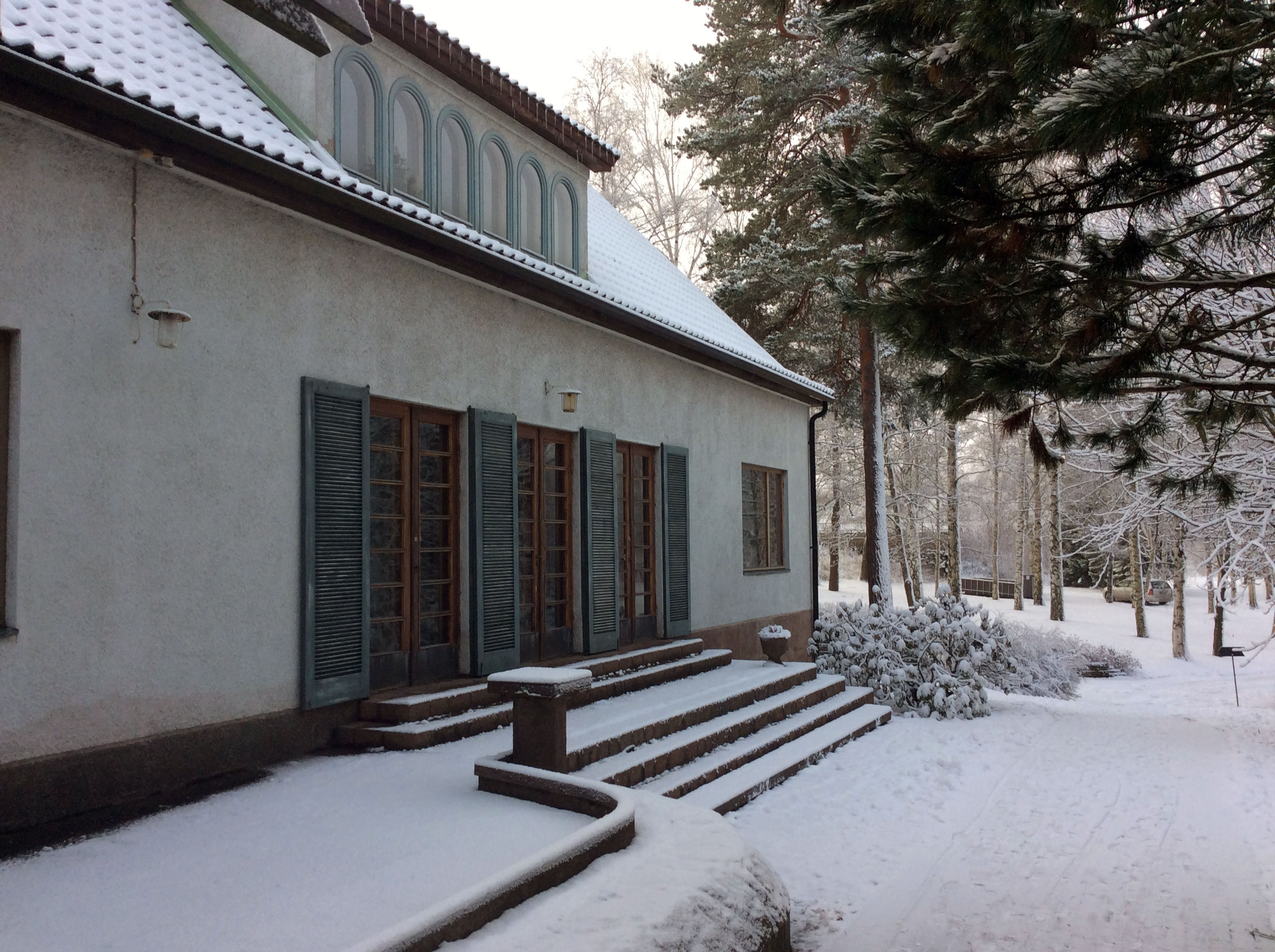 Teresia ja Rafael Lönnströmin kotimuseo.